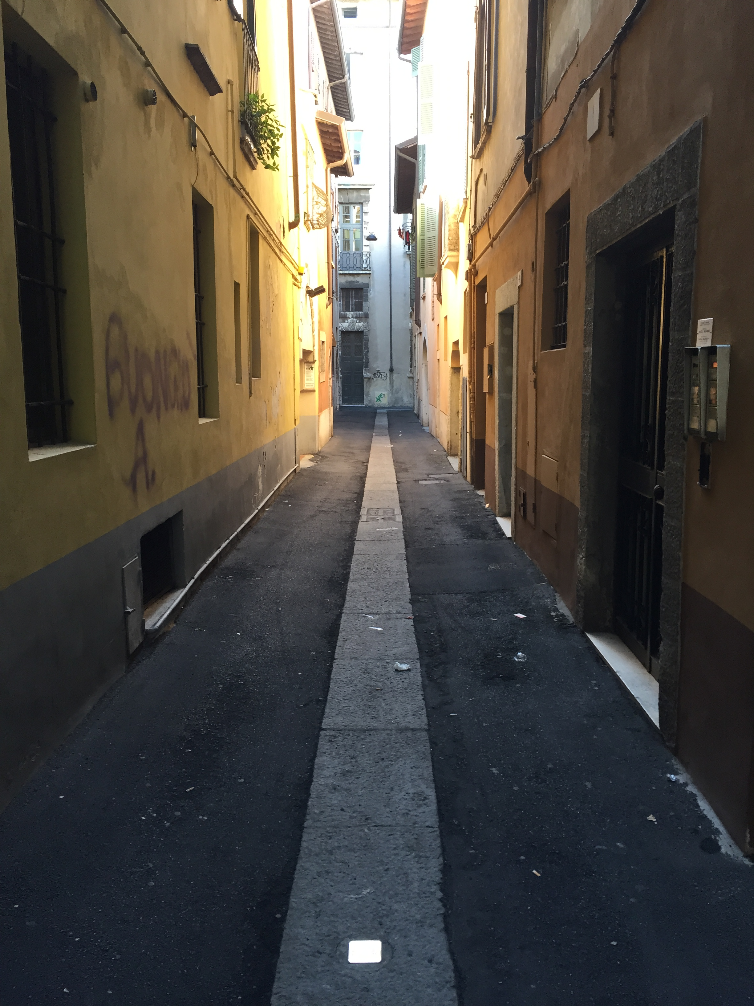 Gasse in Brescia mit Stolperstein für Ubaldo Migliorati